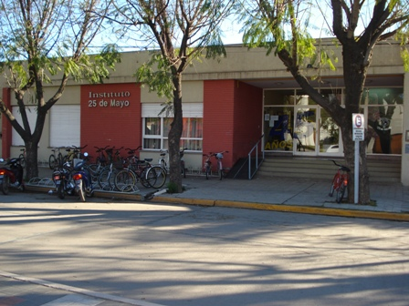 Instituto "25 de Mayo"